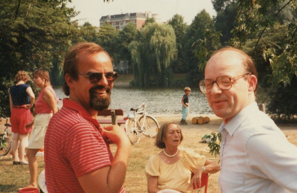 Senator Joist Grolle und Staatsrat Helmut Bilstein auf einer öffentllichen Veranstaltung in Hamburg